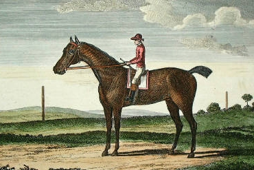 Goldfinder (GB), b.c. 1764 (Snap - mare, by Blank).